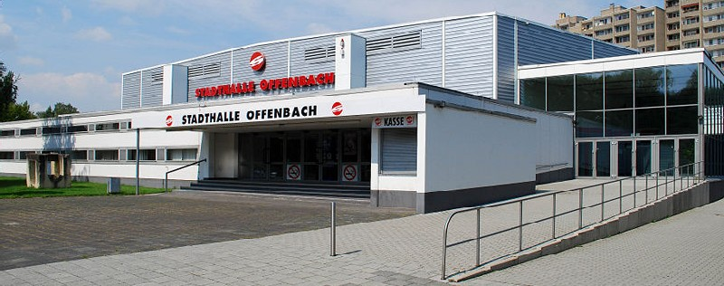 Stadthalle Offenbach